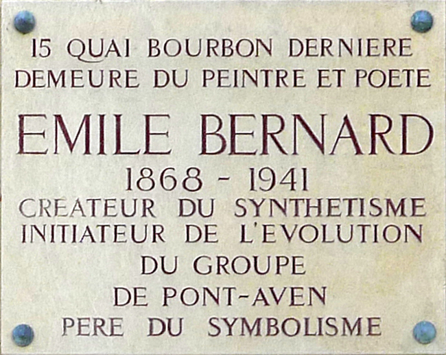 Quai de Bourbon (n°15 : plaque commémorative Emile Bernard) - Paris IV